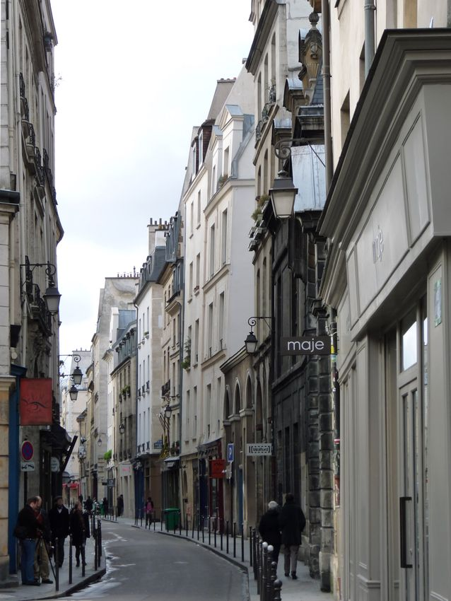 La rue vieille du Temple à Paris. Vue vers le sud depuis la rue des Blanc-Manteaux